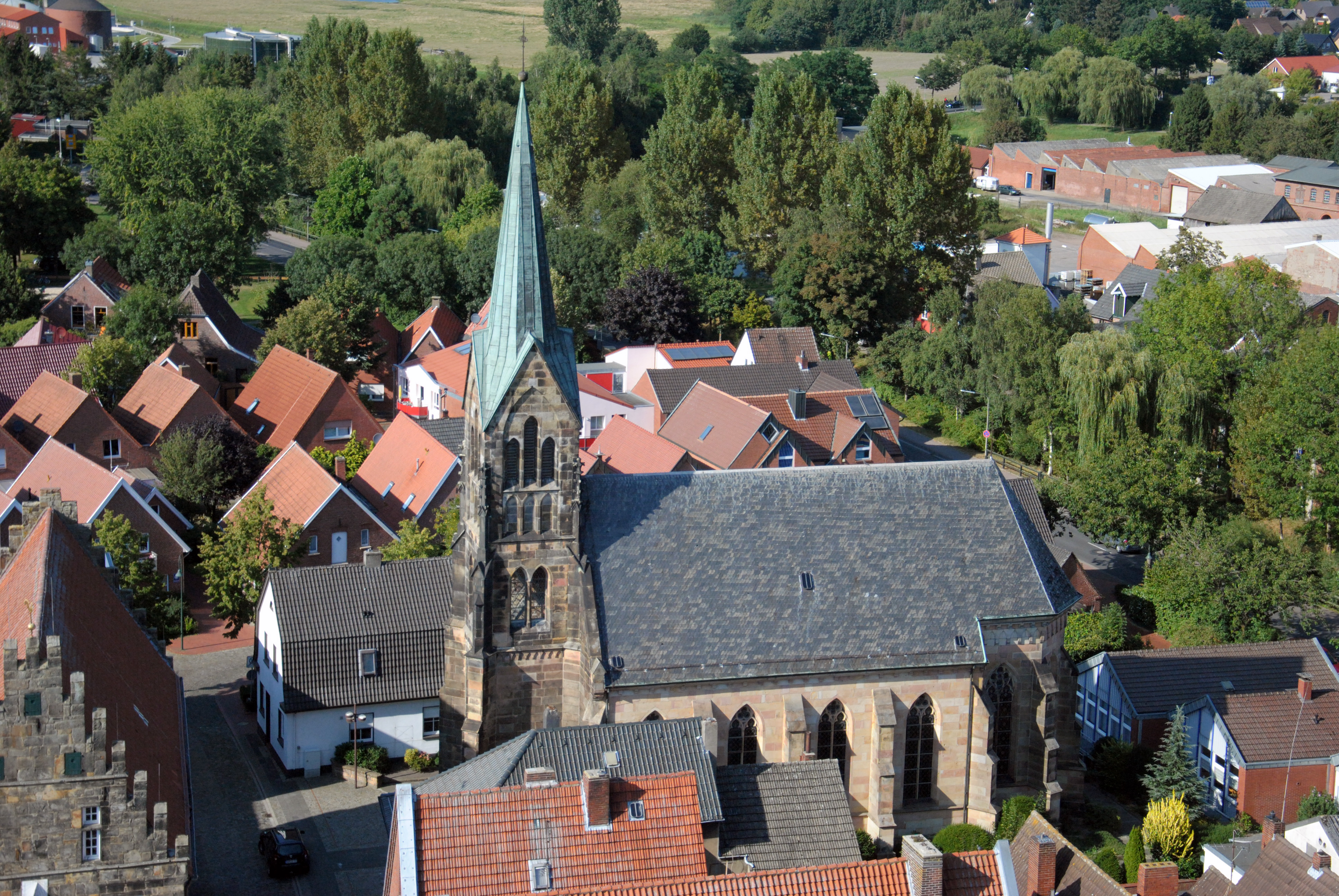 Katholische Kirche - Mariä Verkündigung in Schüttorf